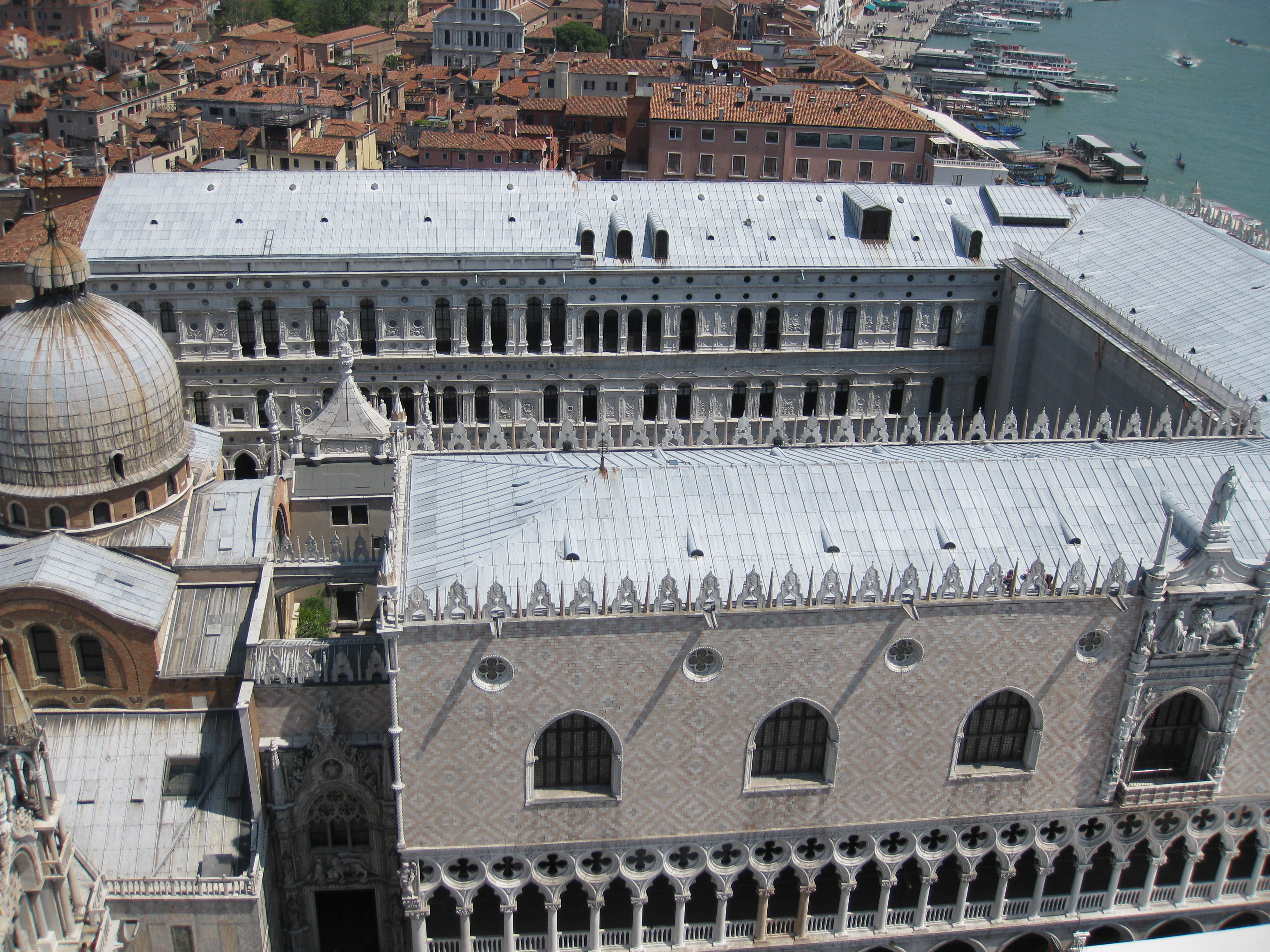 View from the Campanile of St. Marks Basilica הנוף הנשקף ממגדל הפעמונים של כנסיית סנט מרקס